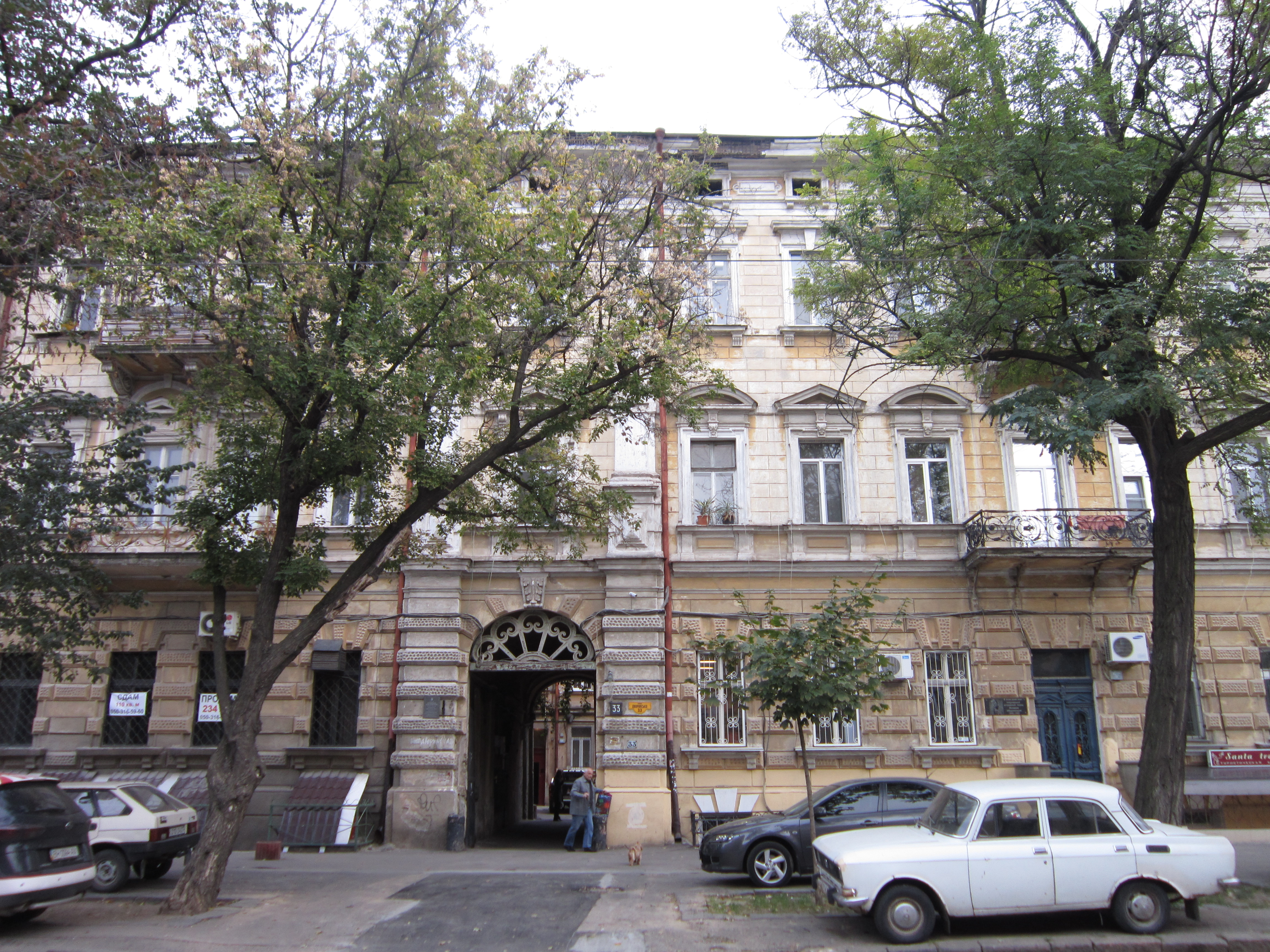 Будинок прибутковий Рогозинської,в якому у 1890-1915 рр. жив Н.В. Циммерман - астроном, голова Астрономічної комісії та Астрономічної ради АН СРСР, професор, Одеса, Дворянська вул., 33